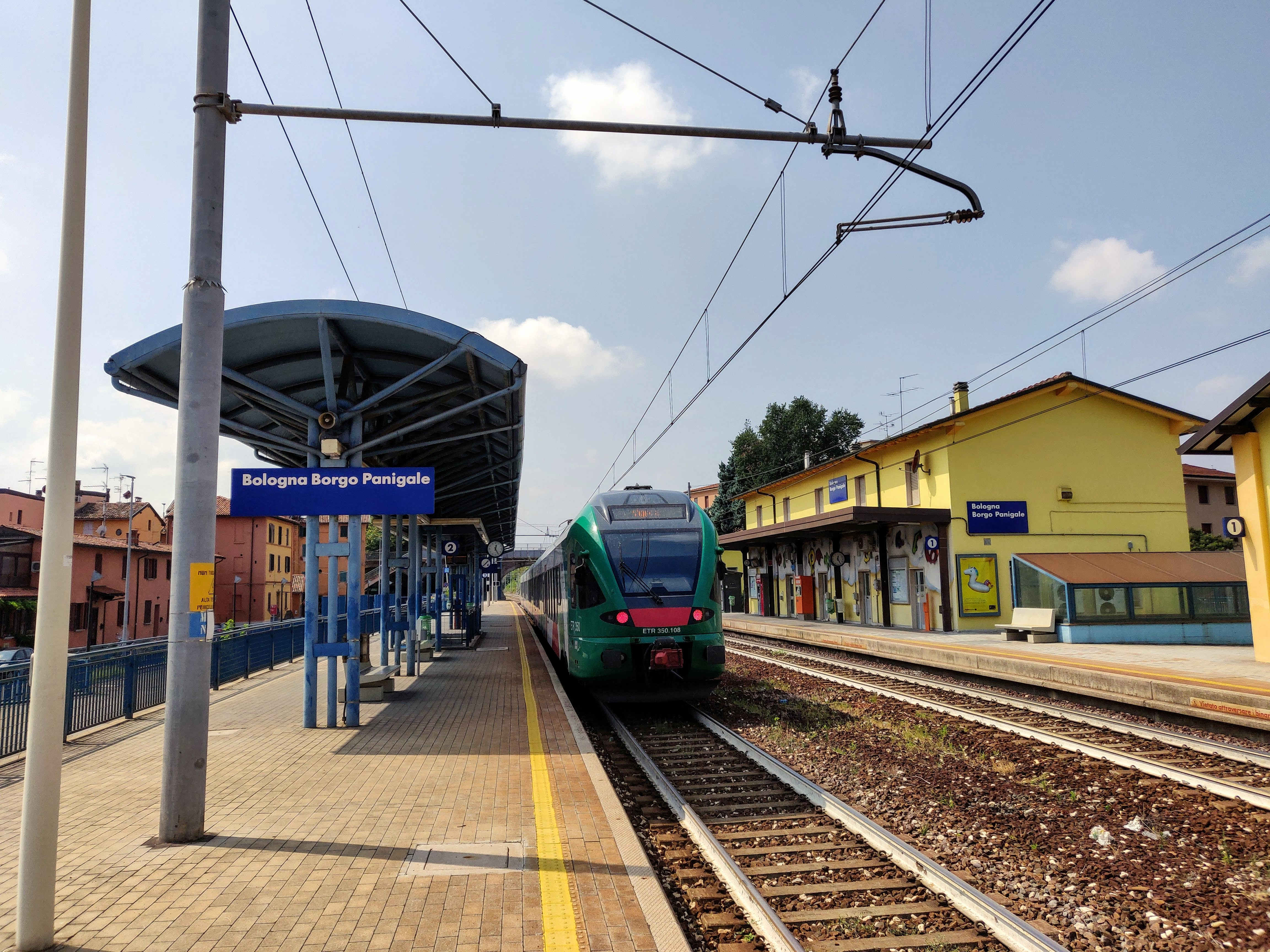 Stazione ferroviaria di Bologna Borgo Panigale. Sul binario 2 è fermo il treno regionale 11461, proveniente da Bologna Centrale e diretto a Vignola.